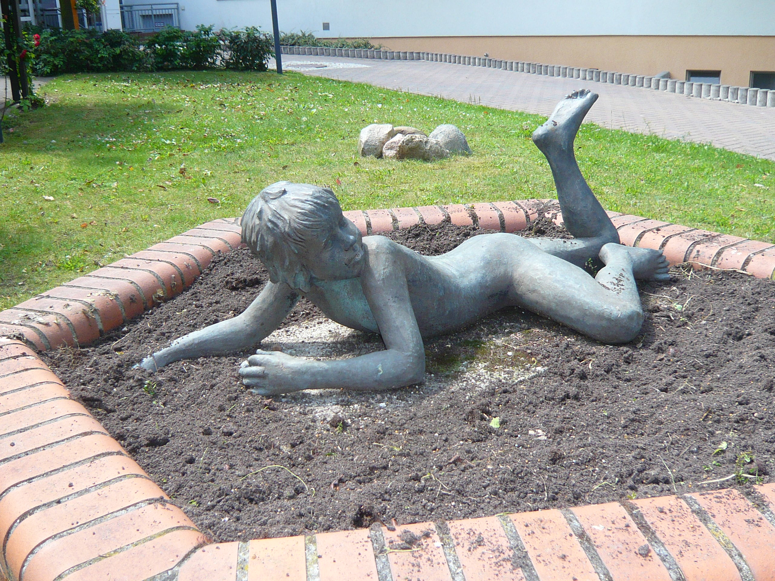 „Knabe“, Bronze, auf dem Freigelände des Seniorenheims „Regine Hildebrandt“ in Bernau bei Berlin